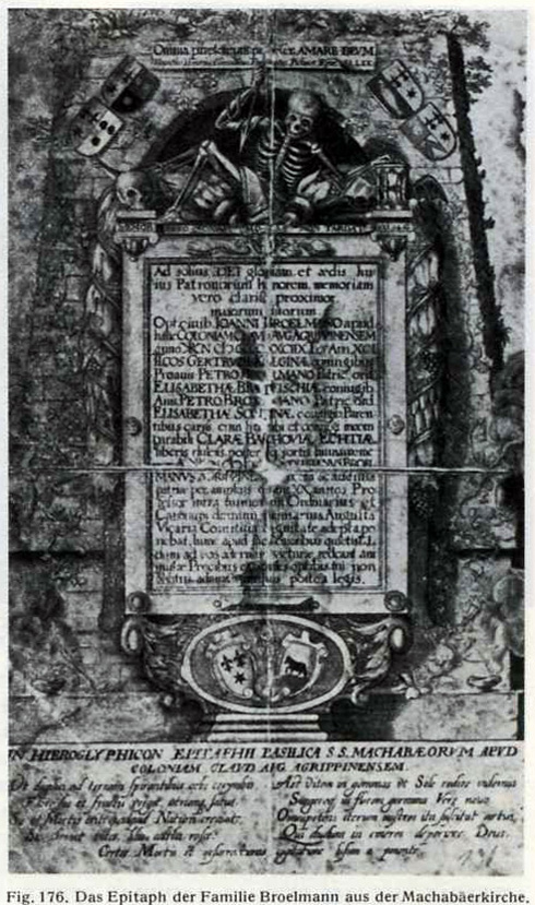 Epitaph der Familie Broelmann Köln 1606, nach einem Kupferstich eines unbekannren Kündtlers. Das Denkmal wurde vor der Familiengruft am Liebfrauenaltar der um 1808 abgebrochenen Machabäerkirche in der Kölner Vorstadt Niederich aufgestellt. Es zeigt (oben rechts und links) vier Wappen seiner Vorfahren und unten die Wappen Brölmann/Bachoven von Echt